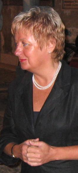 Danica Simčič, Ljubljana's mayor (2002-2006) photo:Ziga 19:48, 10 September 2006 (UTC)